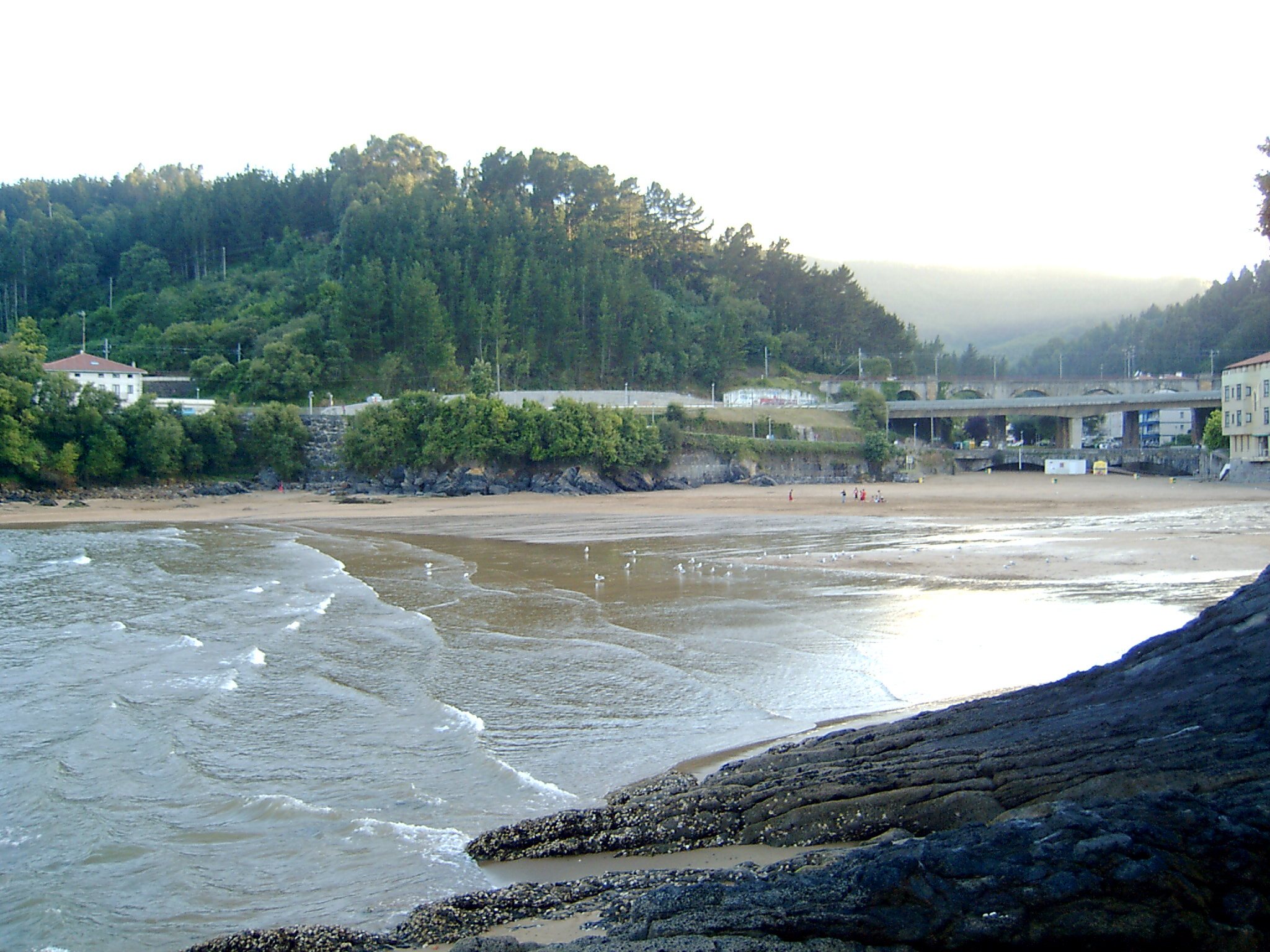 Mundaka beach